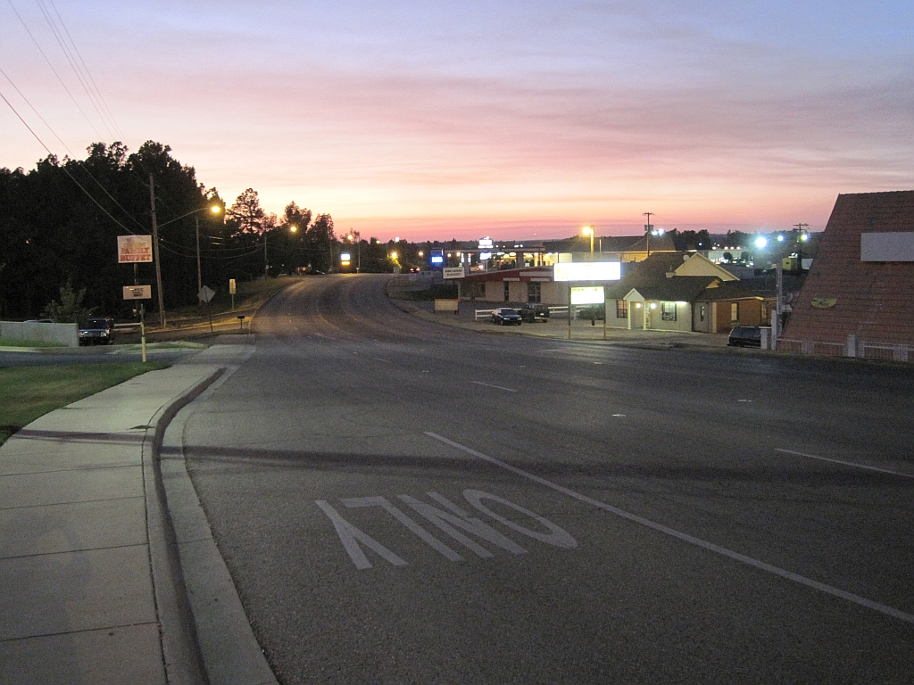 Paragould, Arkansas.